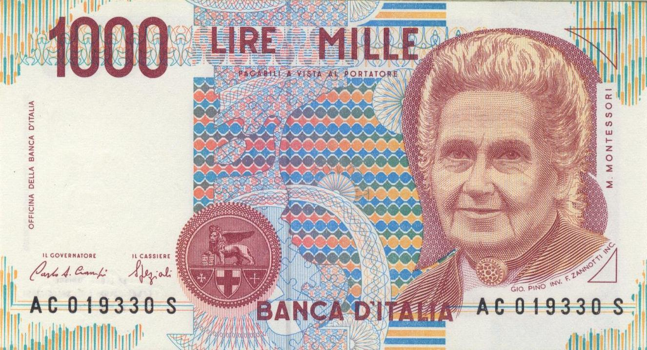 1000 italienische Lire-Banknote mit dem Bild Maria Montessoris